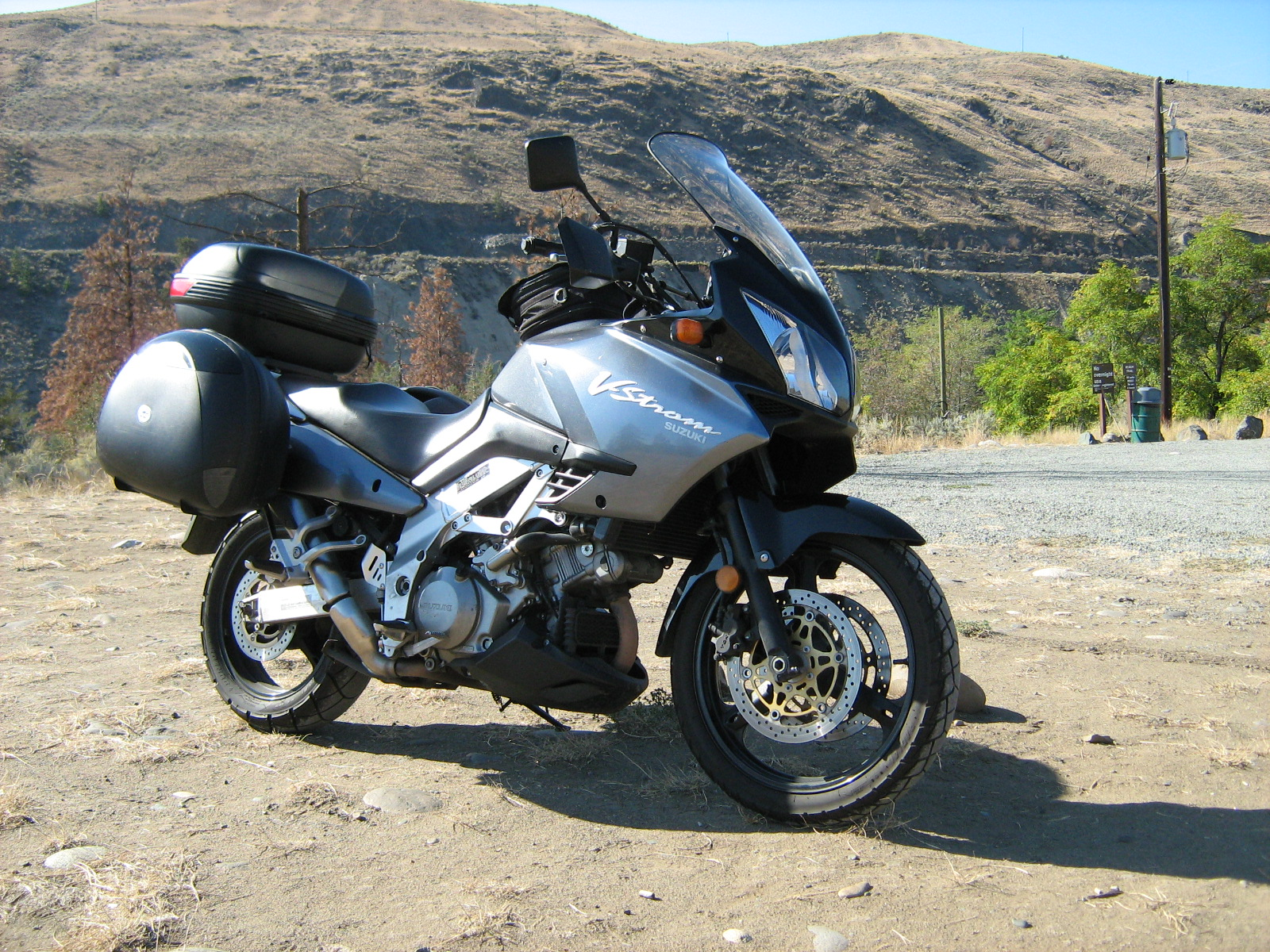 Suzuki V-Strom DL1000 motorcycle